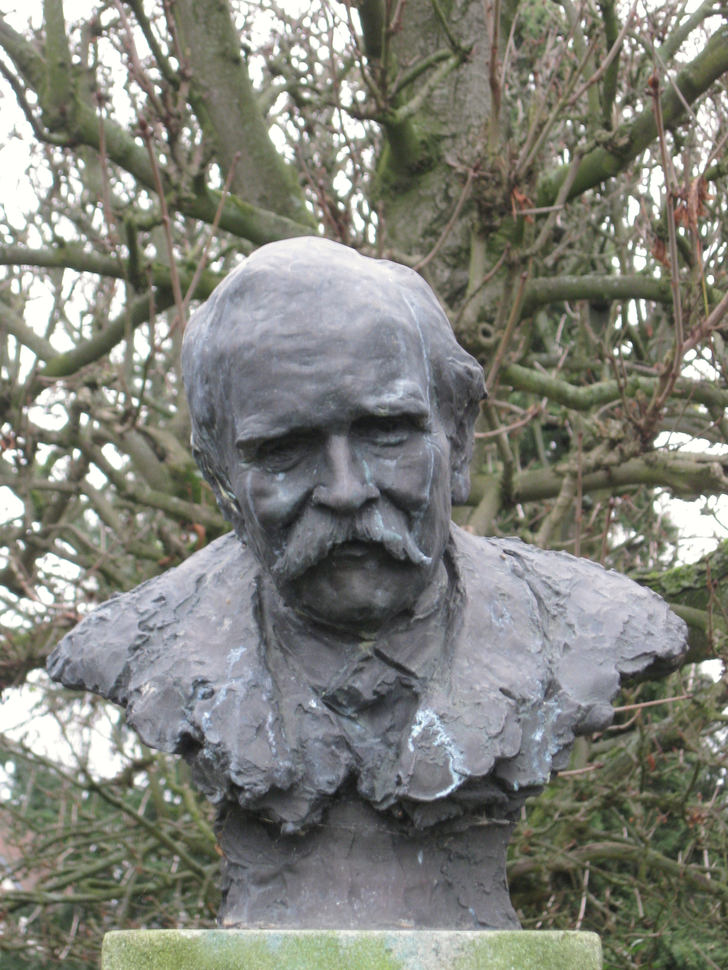 Buste de Pierre Deluns-Montaud (1845-1907) dans le Jardin des Félibres, Sceaux, Hauts-de-Seine, France